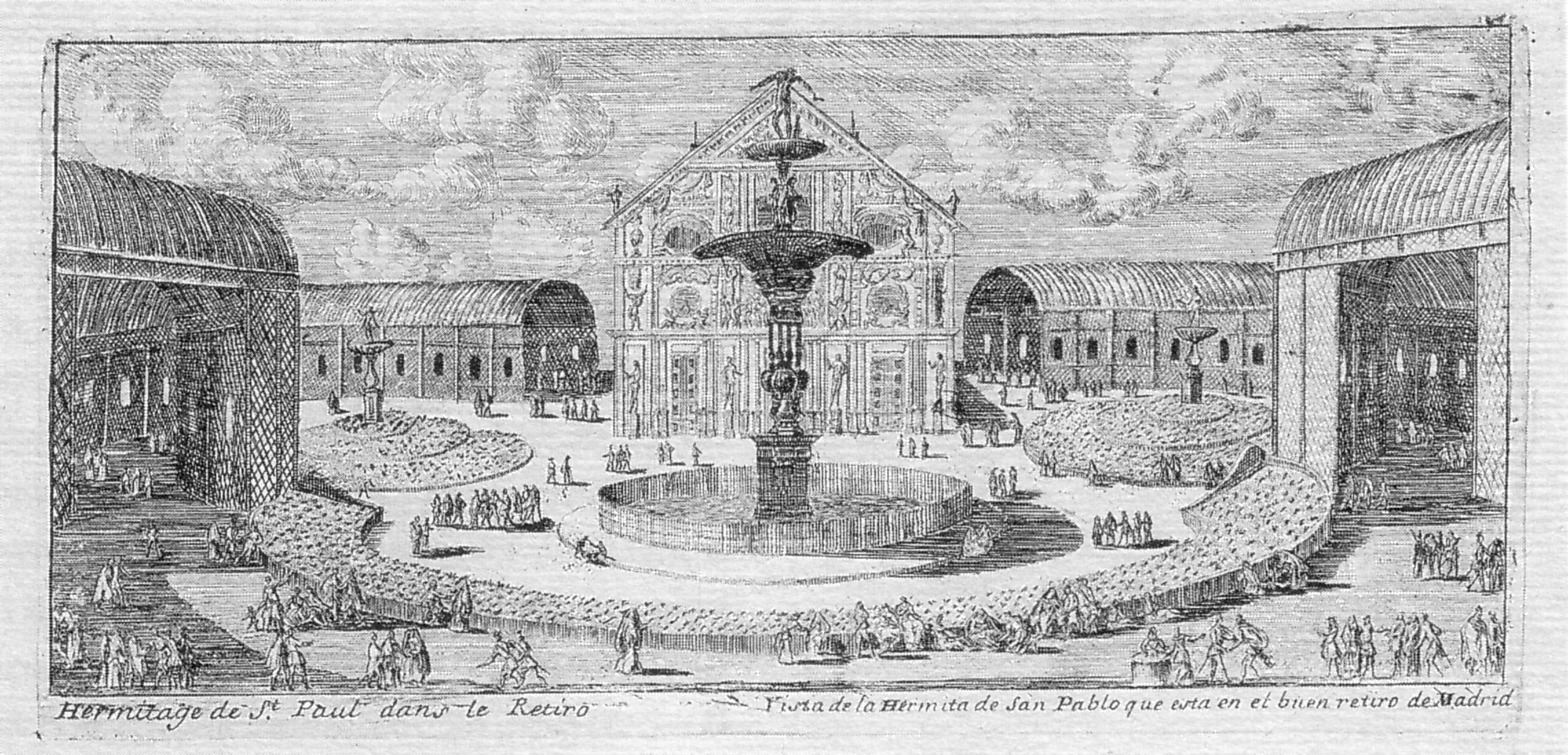 Vista de la fuente ornamental de Narciso, en la glorieta de la ermita de san Pablo, en el Real Sitio del Buen Retiro de Madrid, mandada construir por Felipe IV, con diseños de Juan Gómez de Mora. Cobre, talla dulce (92 x 210 cm.)